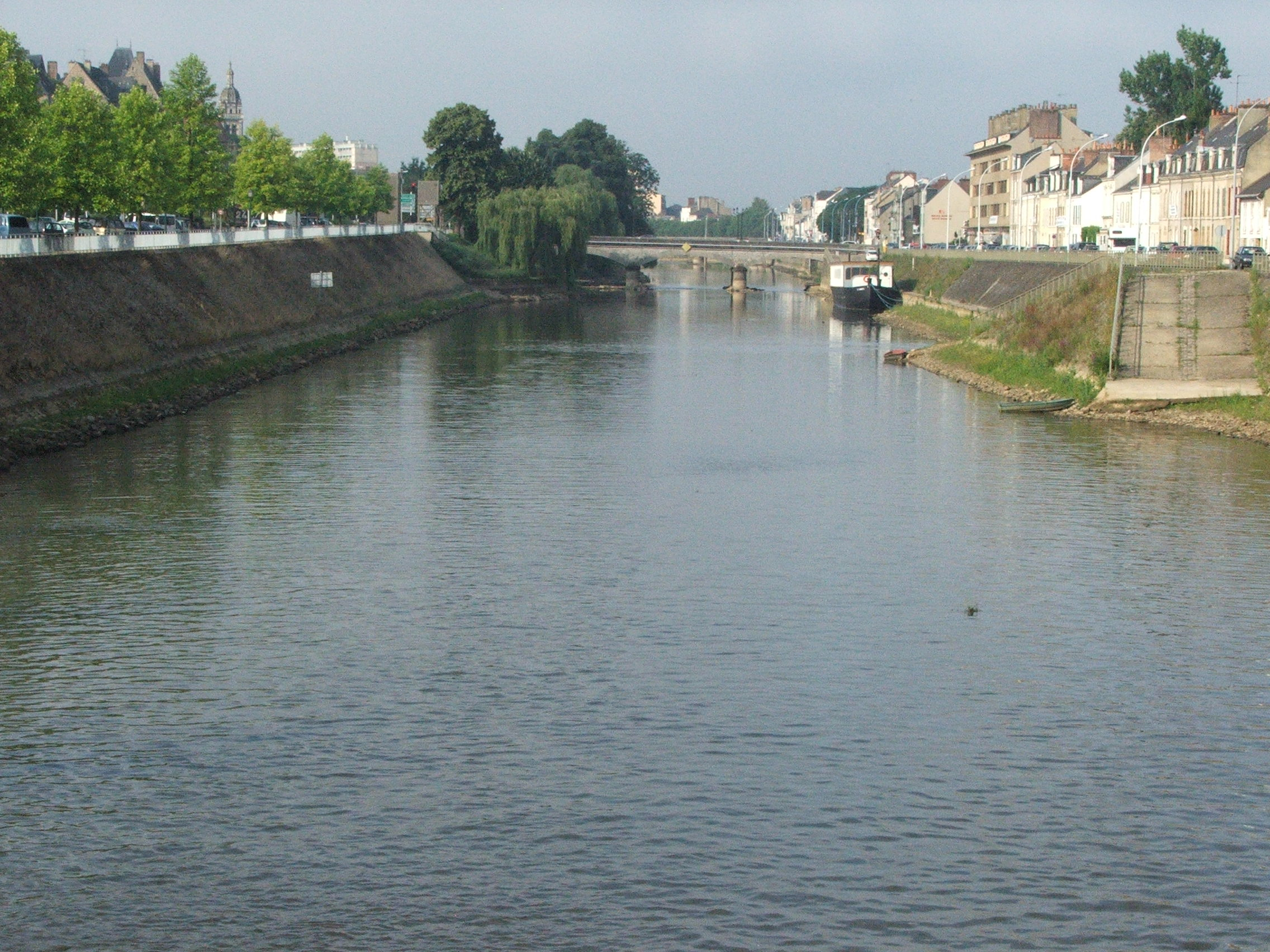 Le canal de la Sarthe, depuis la passerelle d'enfer avec à gauche, la rive gauche (Vieux-Mans) et à droite, la rive droite (quartier du Pré).